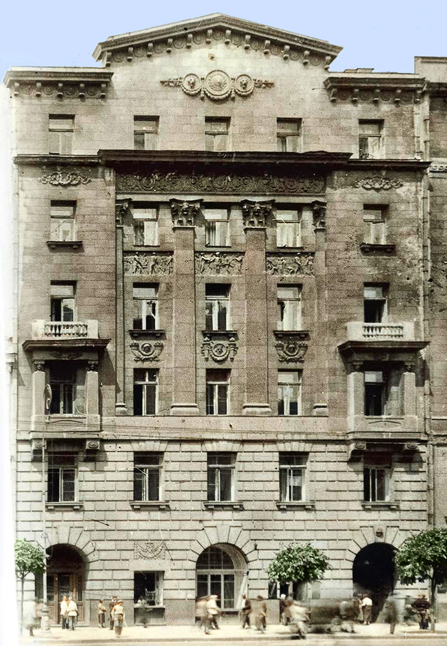 Будинок Волзько-Камського банку, Київ, вул. Хрещатик, 10